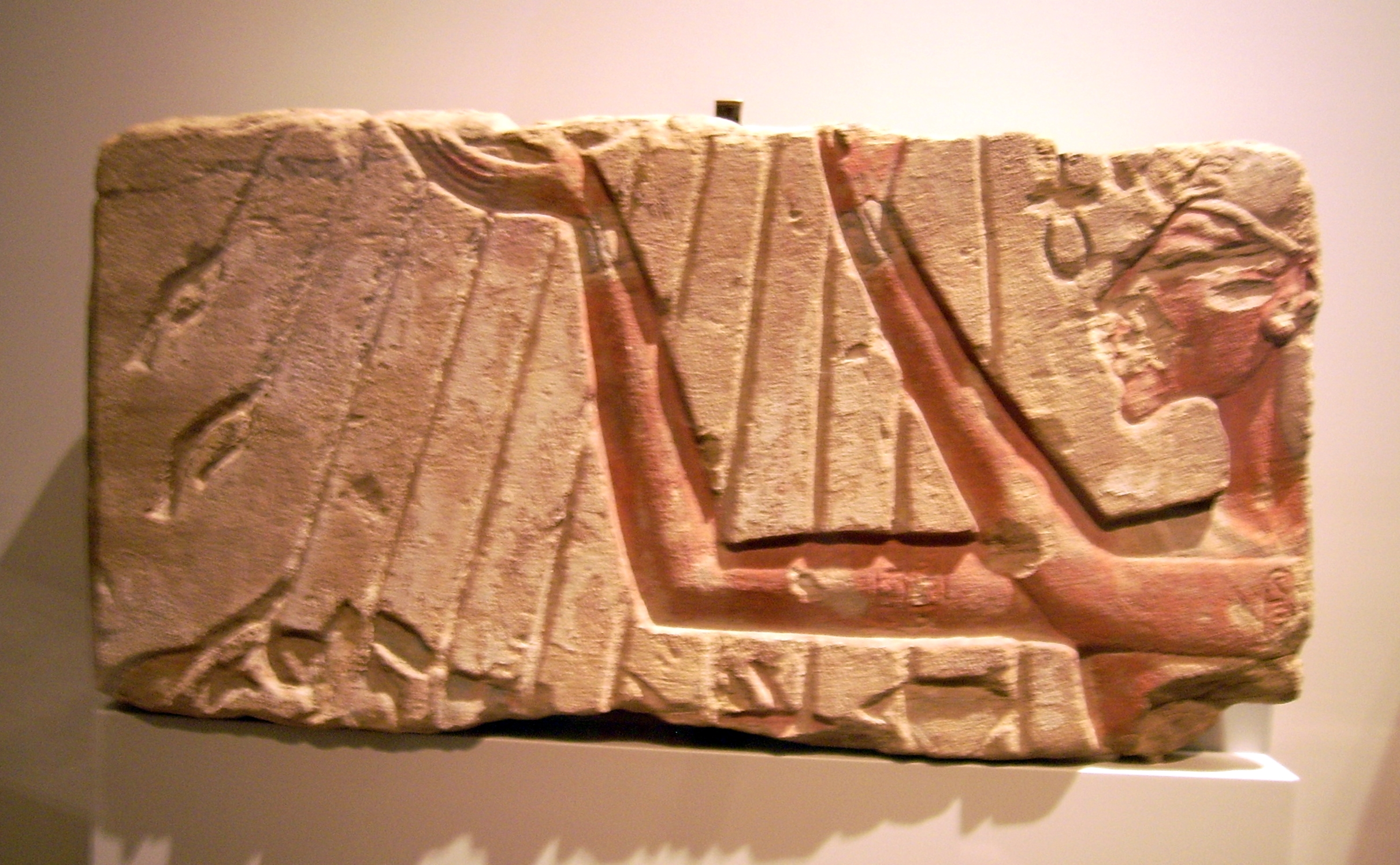 Relieffragment: Echnaton vor Strahlenaton; Neues Reich, 18. Dynastie, um 1350 v. Chr.; Aton-Tempel in Karnak; Sandstein; Inv-Nr. 31283 - Ägyptisches Museum Berlin/Altes Museum